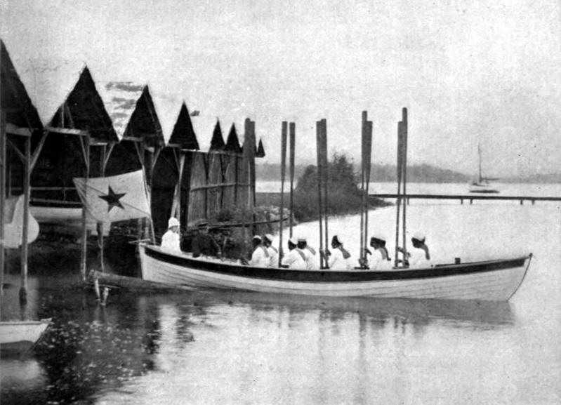 State Pilot Barge, Banana - p. 58